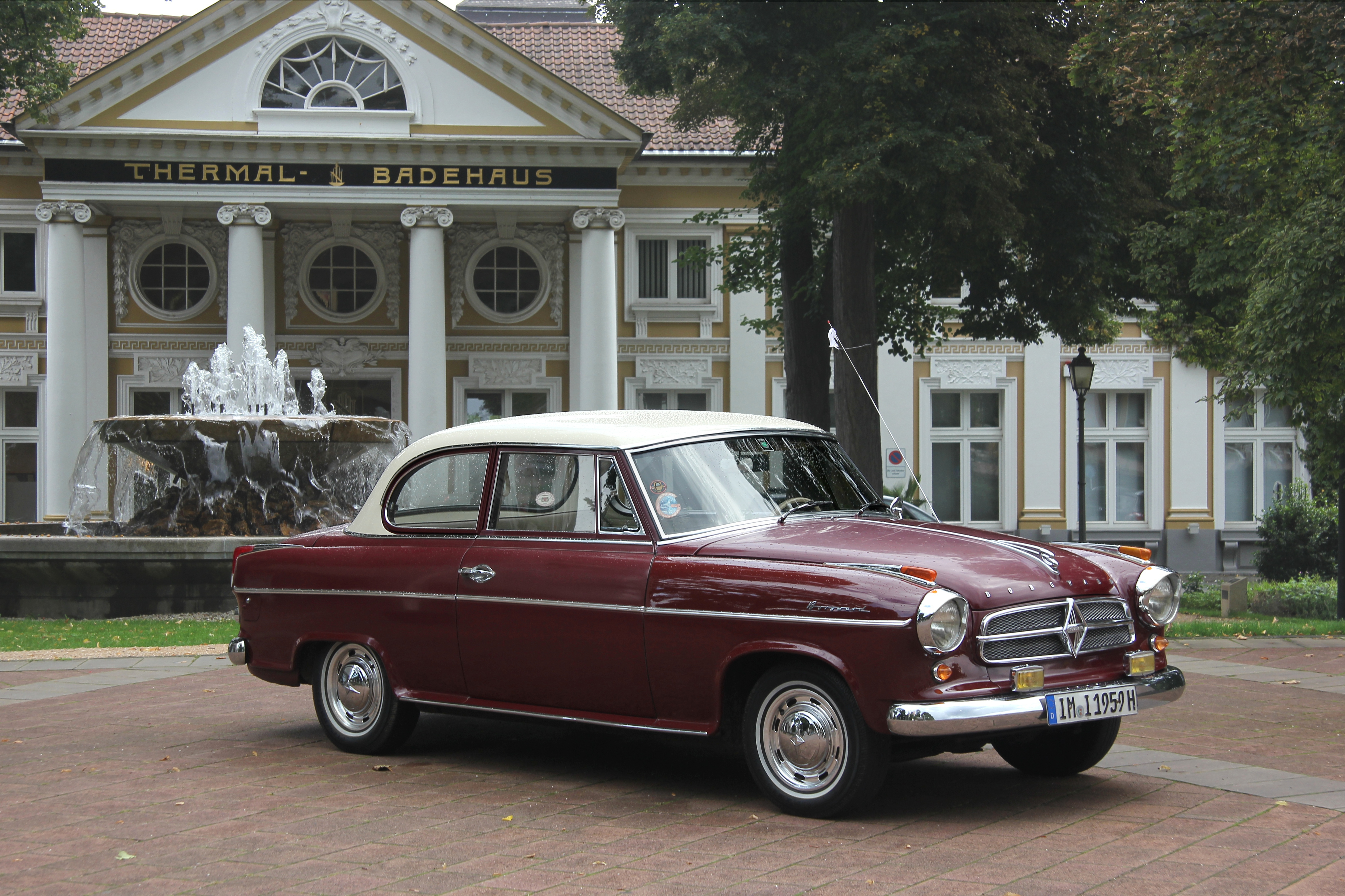 Borgward Isabella, Baujahr 1959, vor dem Thermal-Badehaus in Bad Neuenahr (Kennzeichen des Fahrzeugs verändert)